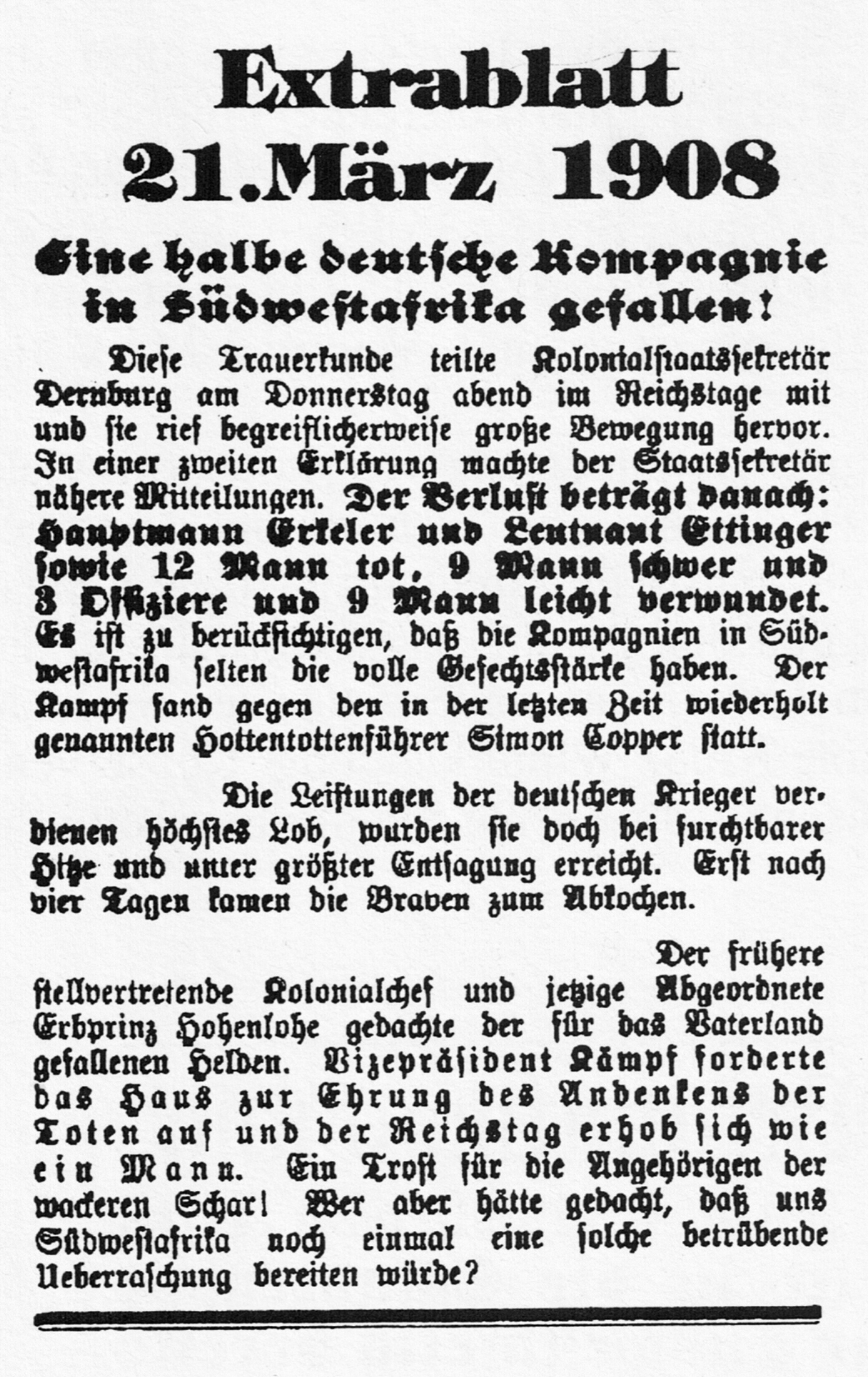 Extrablatt derUetersener Nachrichten vom 21. März 1908